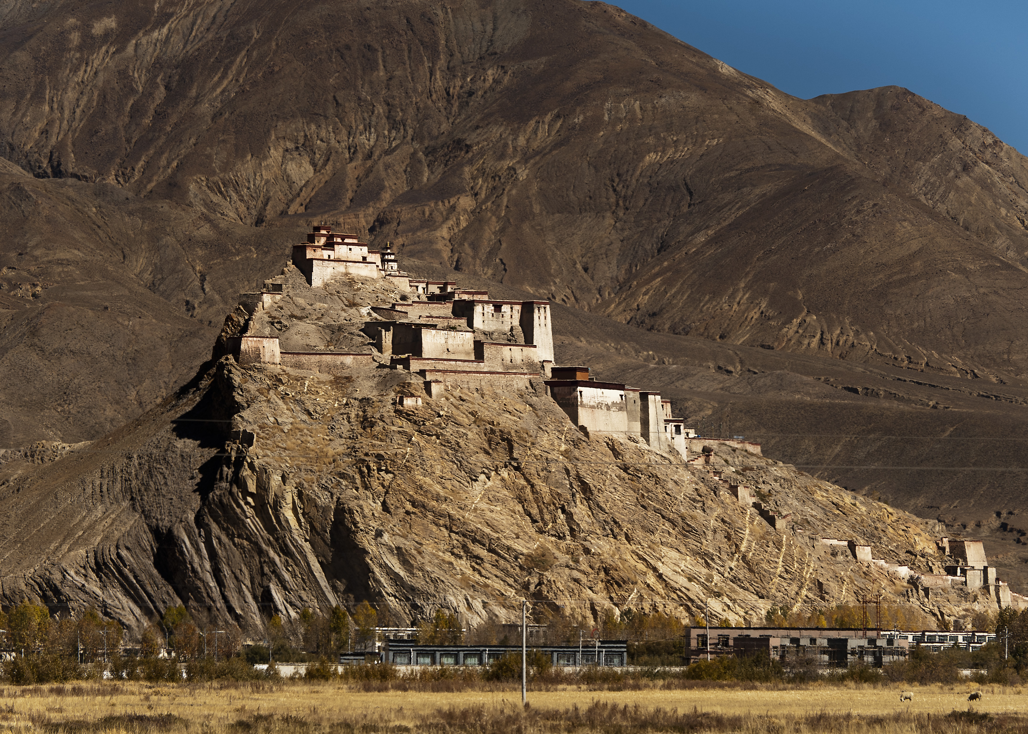 Tibet Gyantse